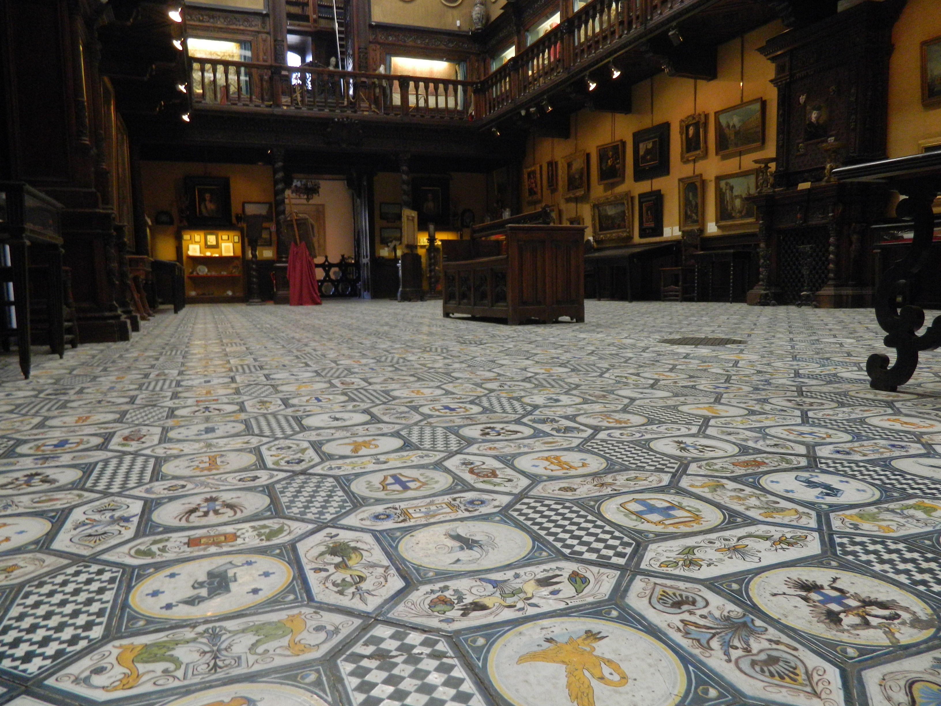 Museo Civico Gaetano Filangieri (Palazzo Como), Napoli.